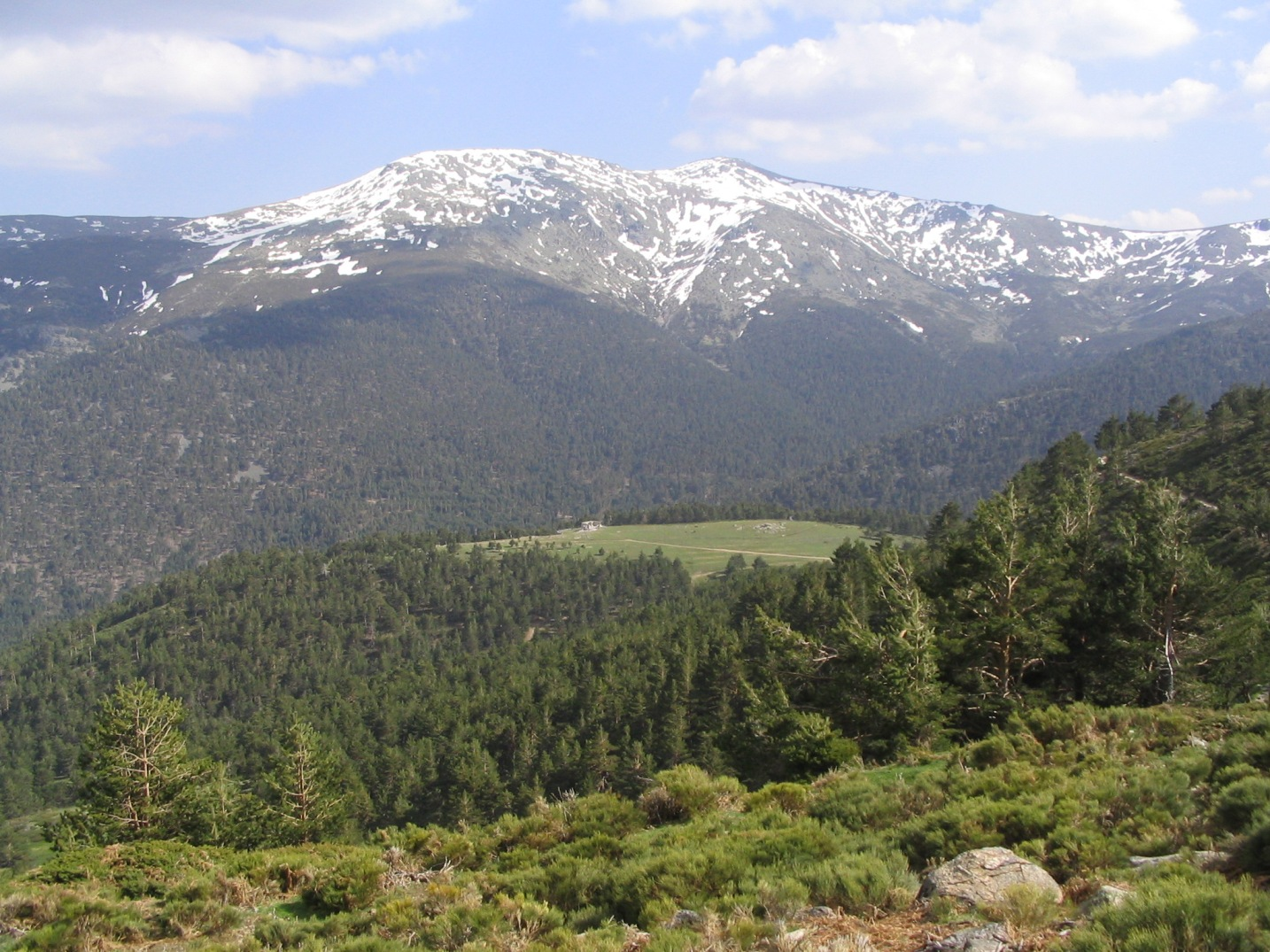 Vista de la cara norte de las dos Cabezas de Hierro. Este par de picos, cuyas alturas son 2.383 y 2.374 metros, son los terceros más altos de la Sierra de Guadarrama (centro de España) y la máxima elevación de Cuerda Larga, una sierra que se extiende de oeste a este desde los puertos de Navacerrada y Morcuera. De las dos cimas de las Cebezas de Hierro, la de la izquierda es la Cabeza de Hierro Mayor, la cual es la más alta de las dos (2.383 m) y la que tiene una cima más redondeada. El nombre de este par de picos proviene del hierro que hay en su zona más alta. El ascenso más común a estas montañas se realiza saliendo del puerto de Navacerrada, pasando antes por la Bola del Mundo (2.265 m) y por el Cerro de Valdemartín (2.280 m). La fotografía está tomada desde el Parque Natural de Peñalara, y en ella se aprecian los bosques de pino silvestre que tapizan la vertiente norte de esta montaña, pertenecientes a su vez al Valle Alto del Lozoya. La imagen fue tomada el 30 de abril de 2006.